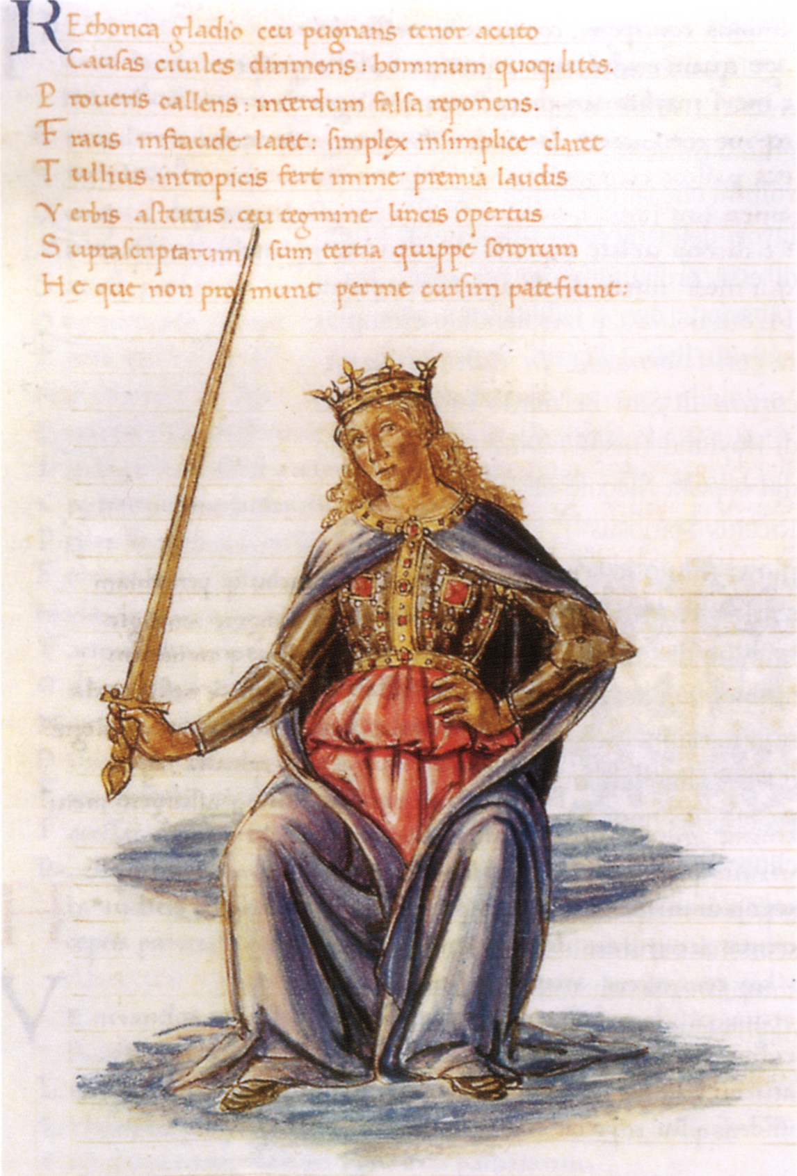 Gherardo di giovannid el fora, retorica, in marziano capella de nuptiis philologiae et mercurii, ms. urb lat 329 f 64v bibl ap vat